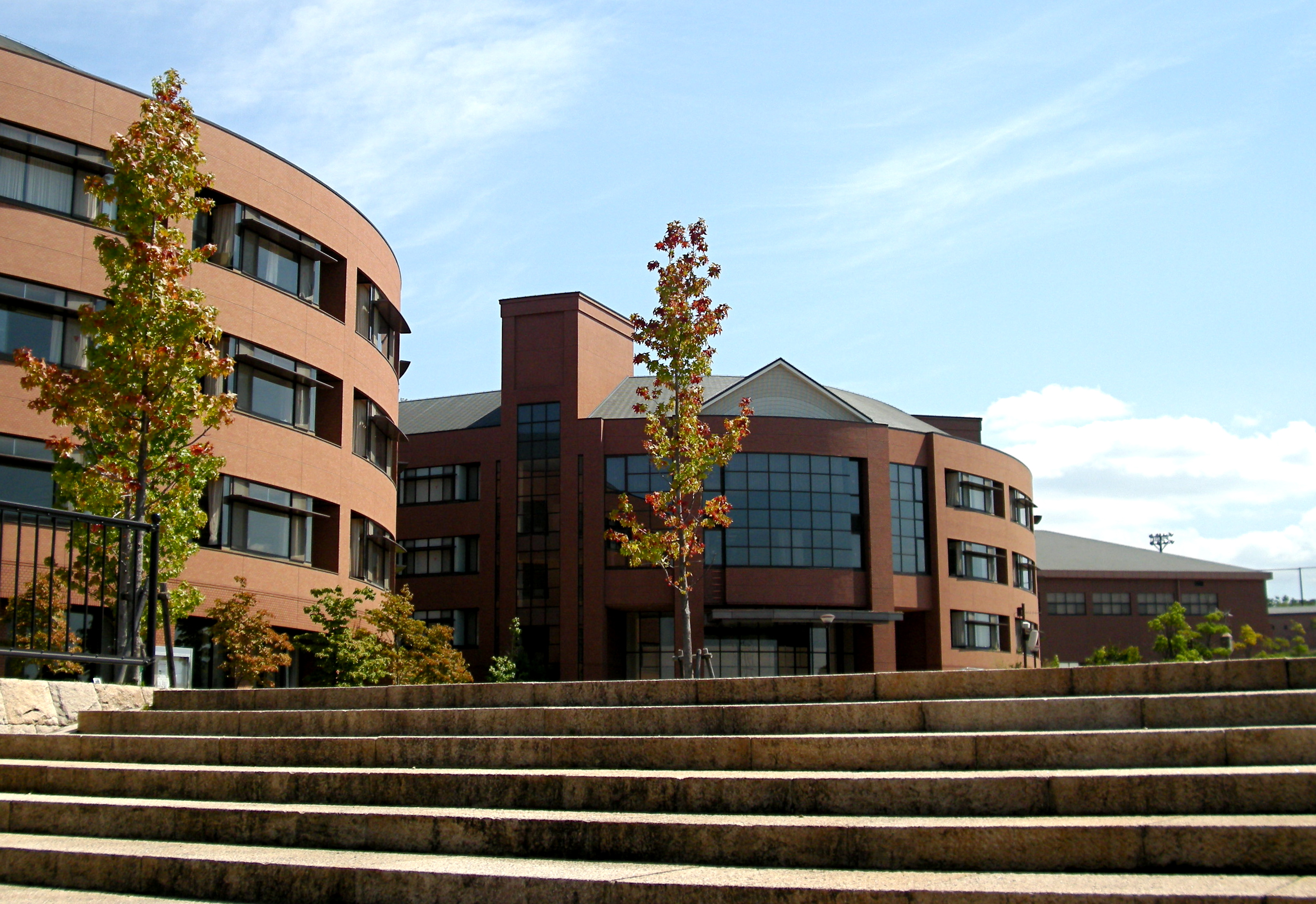 Ritsumeikan Uji High School (Uji, Kyoto, Japan)